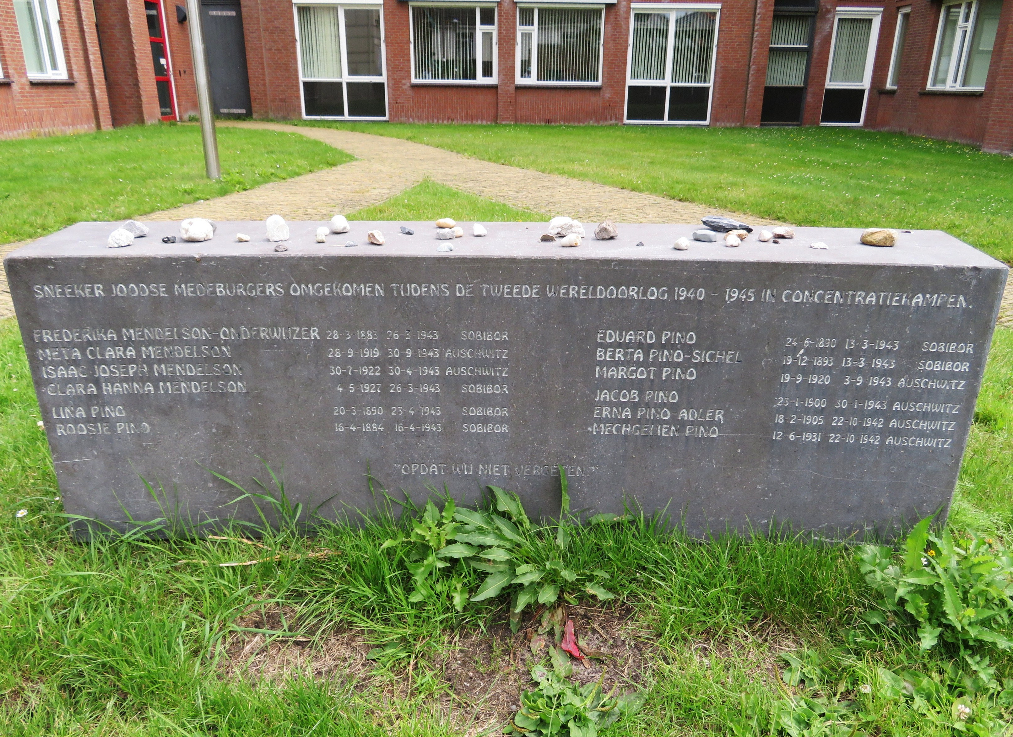 Joods monument Stadhuistuin Sneek